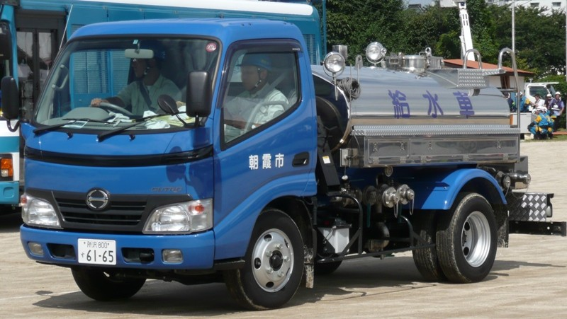 朝霞市の給水車